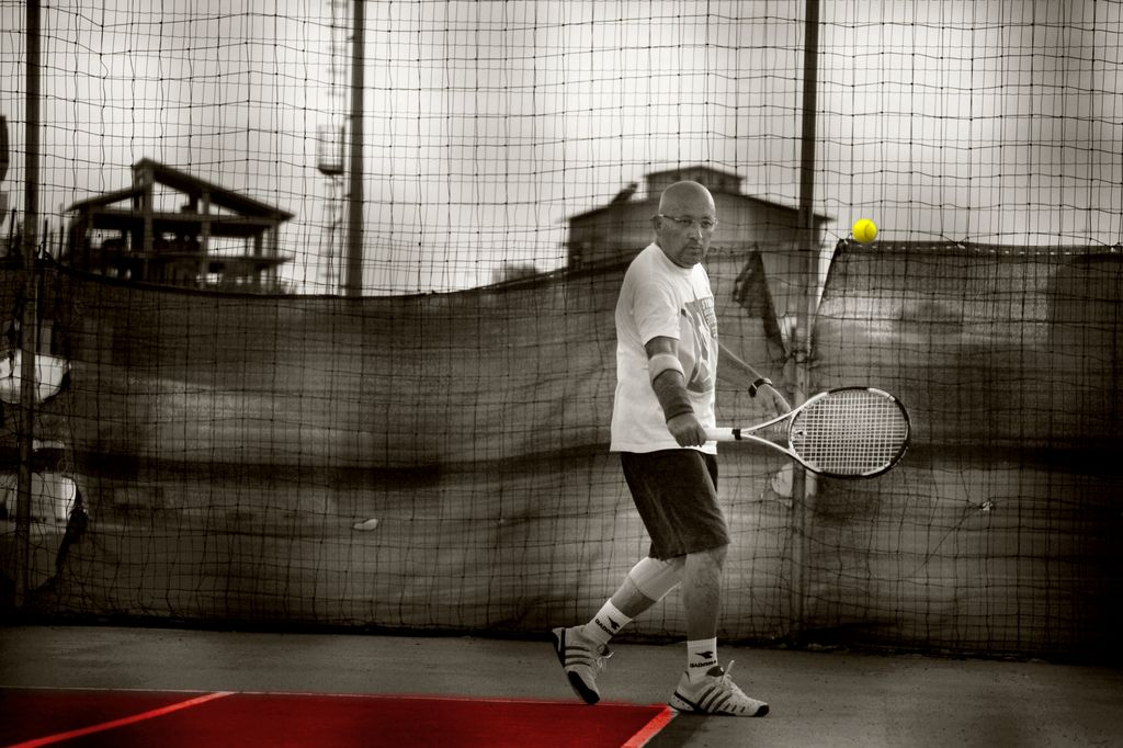 Impianto comunale